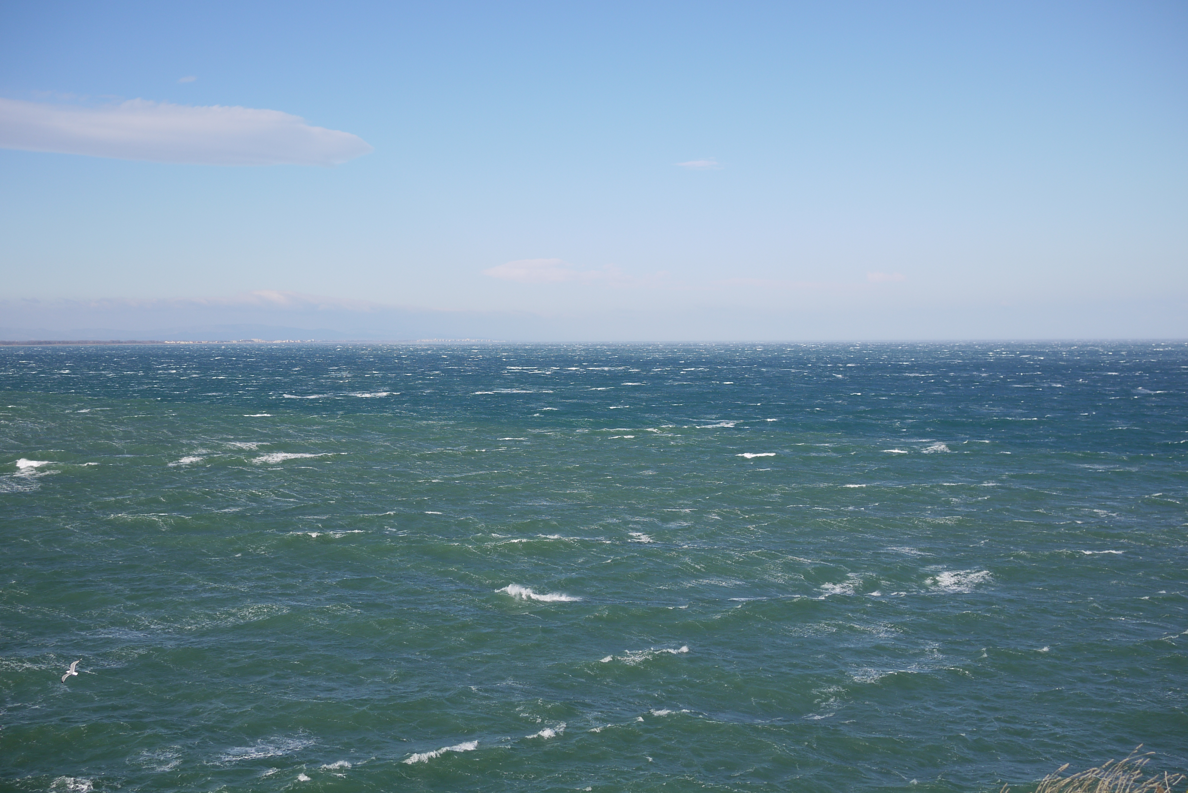 Une mer agitée par la Tramontane soufflant le long de la Côte Vermeille. Collioure, Pyrénées-Orientales, France.